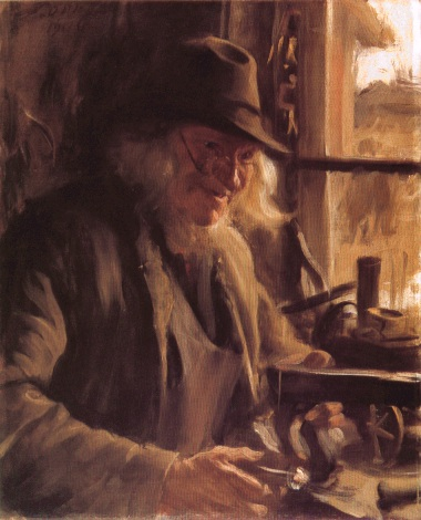 Watchmaker and instrument maker